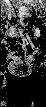 若き日の川路太郎（寛堂） 渡英の際に上海で撮ったもの